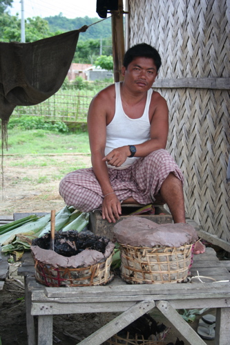 shrimp paste